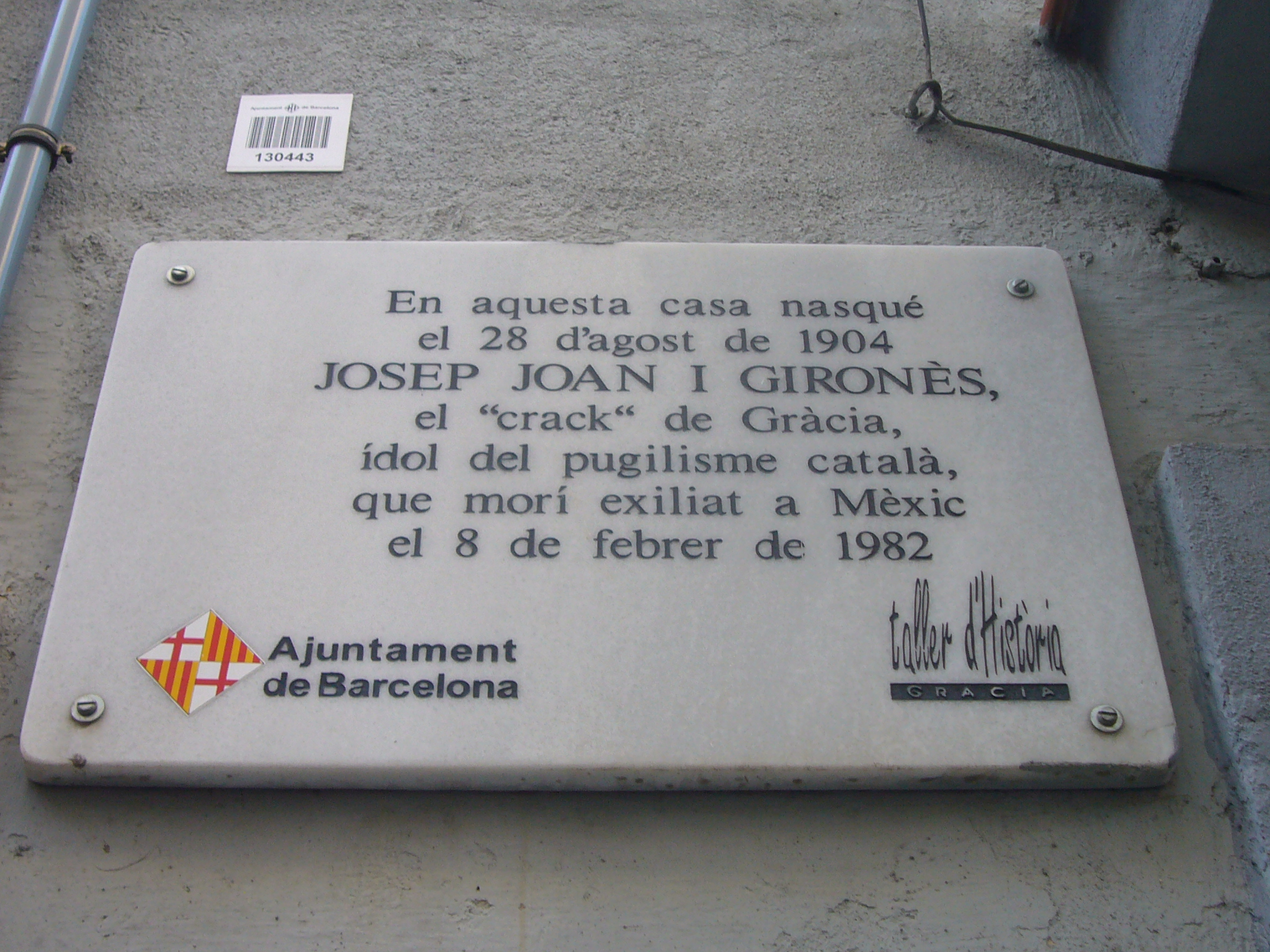 Placa a la casa natal del boxejador gracienc Josep Joan Gironès, al carrer Llibertat, 29, Barcelona